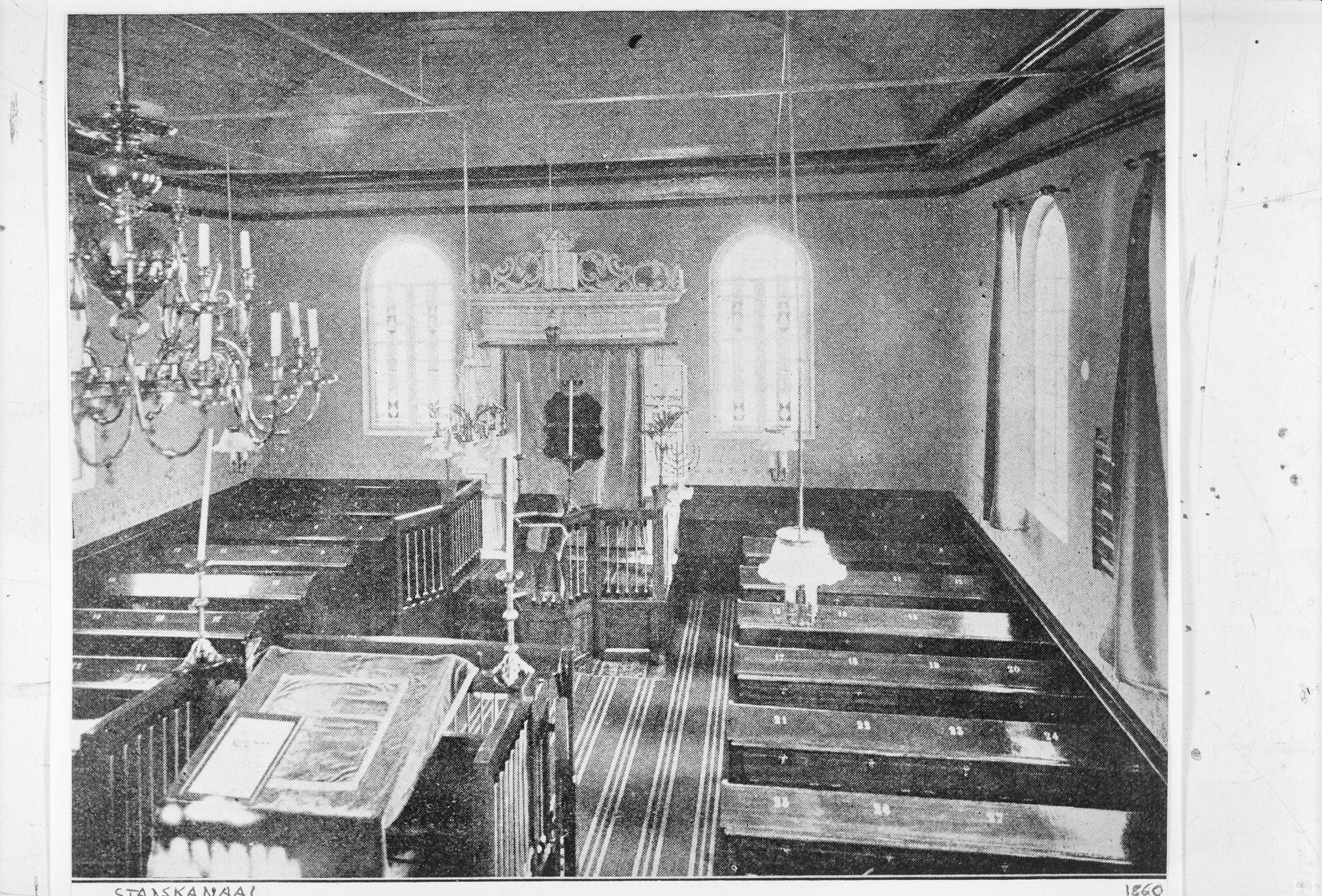 Synagoge: Interieur van de synagoge te Stadskanaal met biema (= verhoging voor het voorlezen van de Tora), Heilige Arke en kroonluchter